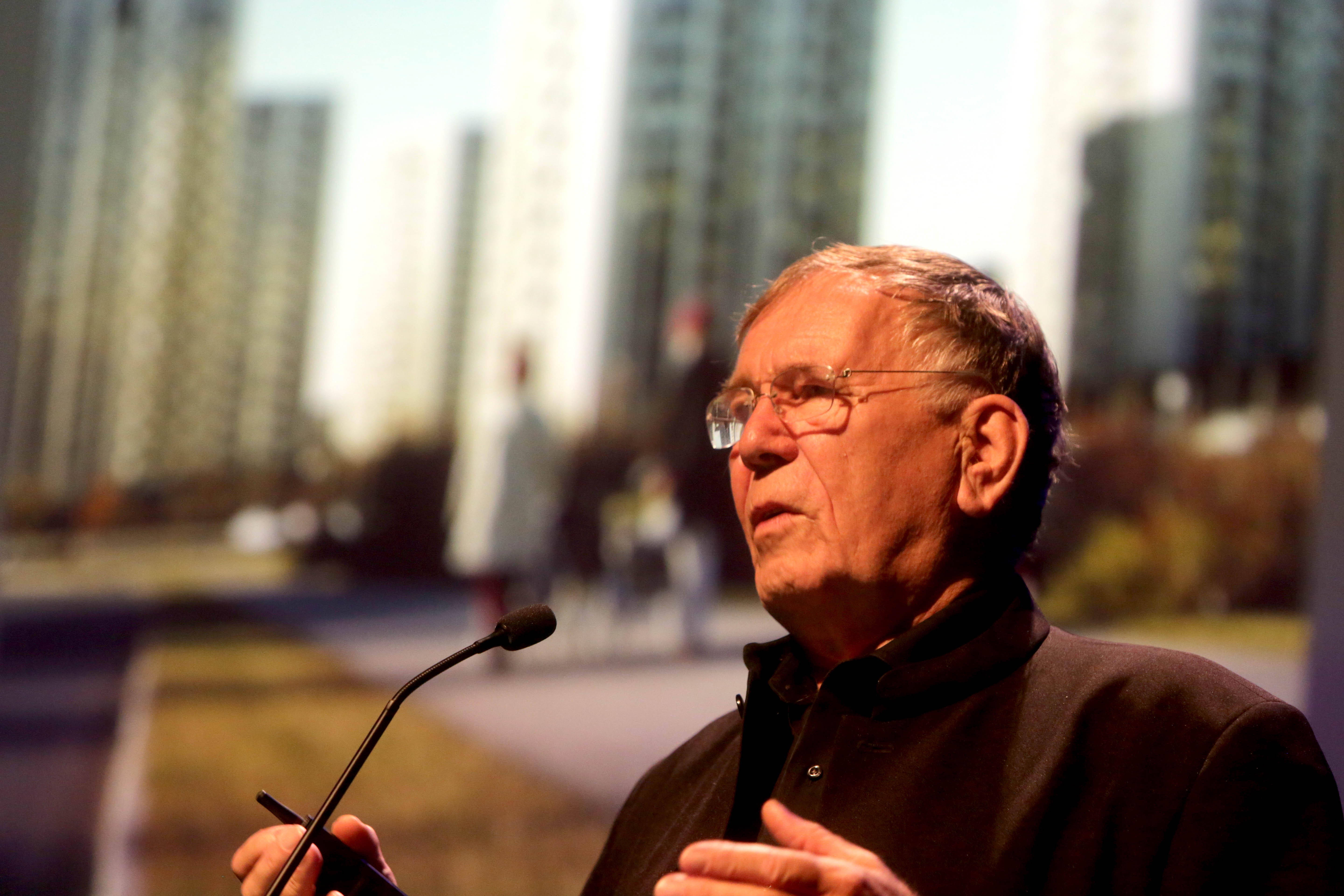 Convidado: Jan Gehl, arquiteto e urbanista dinamarquês Data: 24 de novembro de 2016 Local: Teatro Cetip-Complexo Ohtake Cultural Crédito das imagens: Fronteiras do Pensamento | Greg Salibian